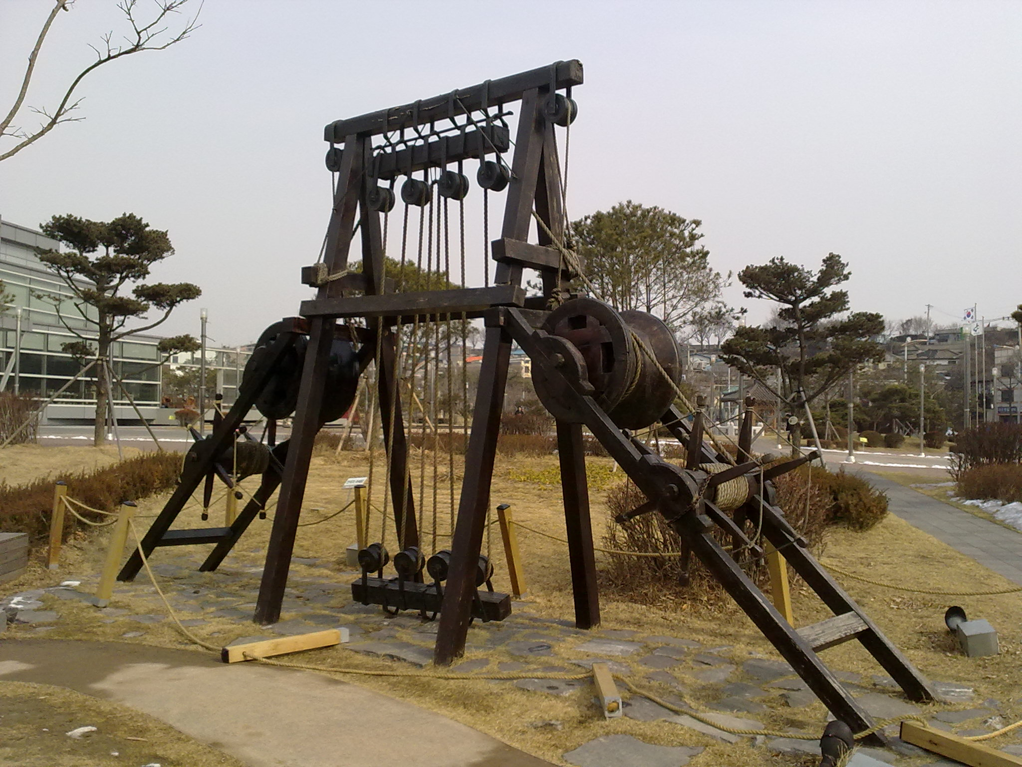 수원 화성 만들 때 쓴 거중기 (수원화성박물관 앞에 있는 것)